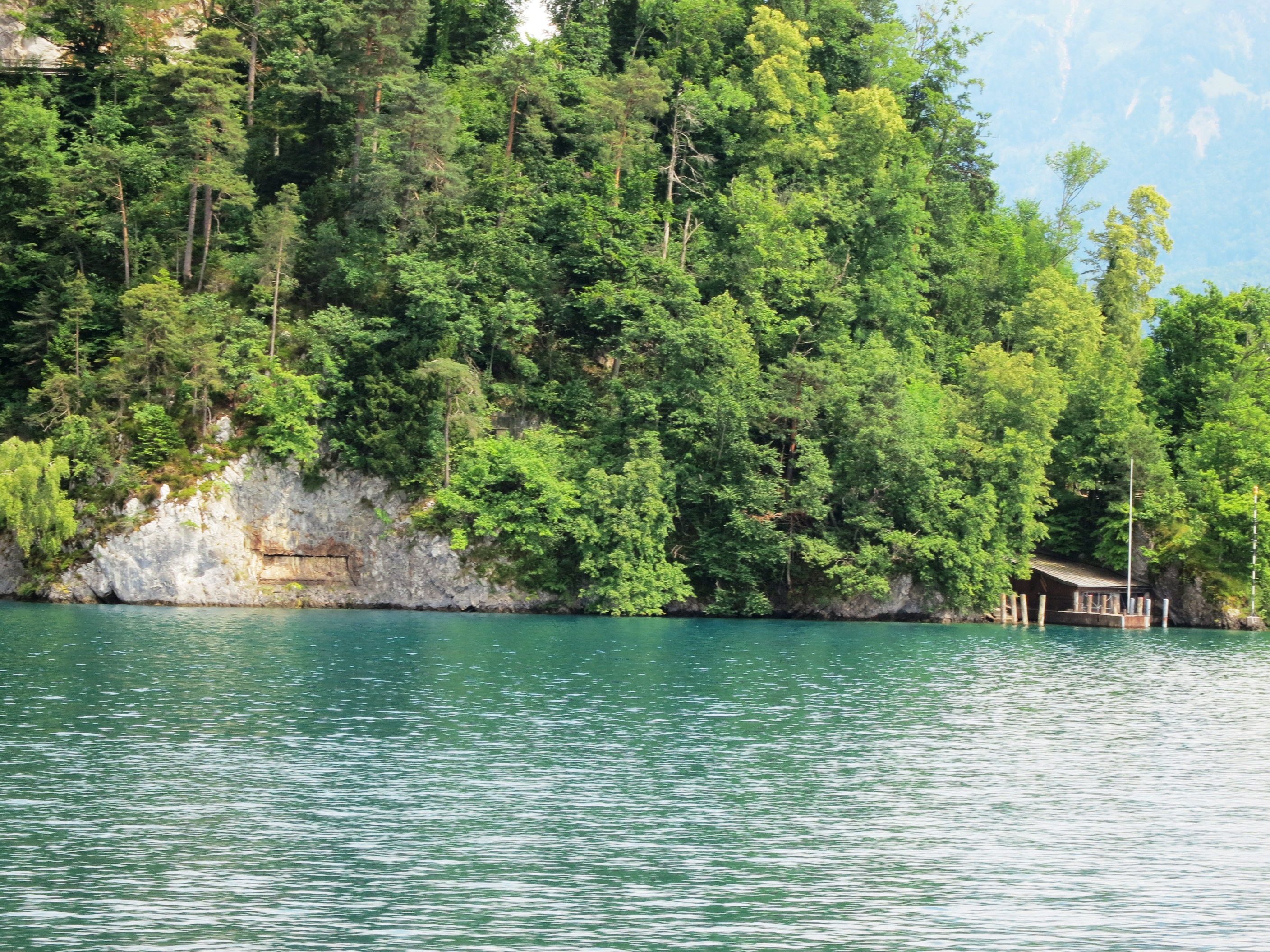 Obere Nas, Vitznau LU, Schweiz : A2215 Obere Nas